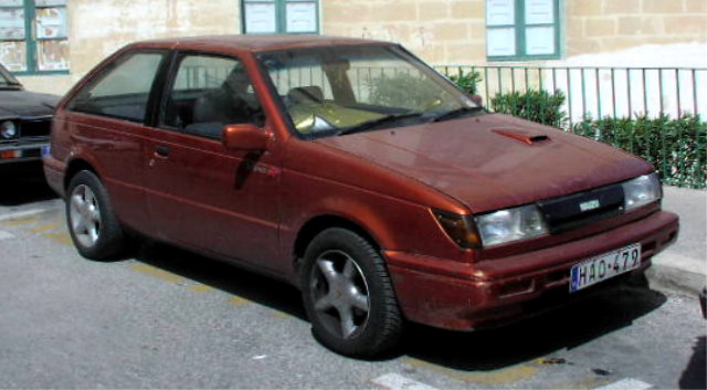 Isuzu Gemini II Hatchback